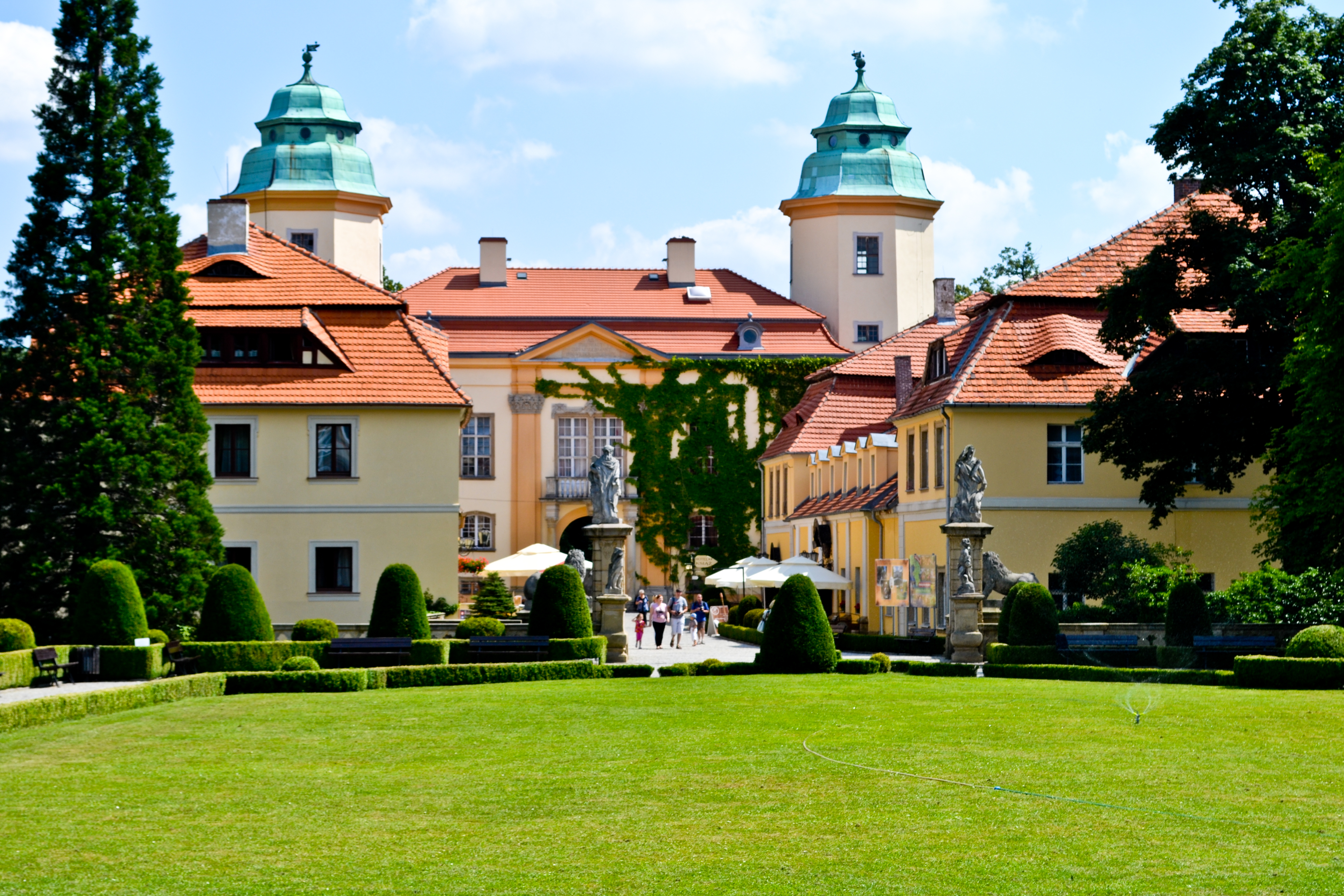 Wałbrzych, budynek_bramny (biblioteka), 1718-1719, 1890